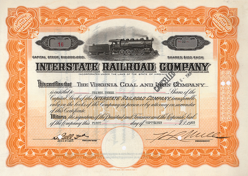 Aktie der Interstate Railroad Company vom 26. Oktober 1917